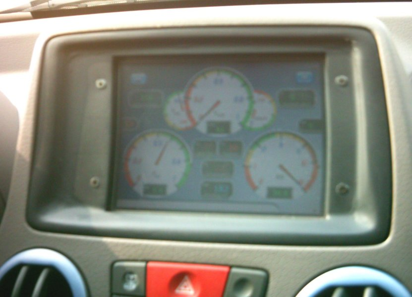 Prototipo Fiat Panda Hydrogen del 2006 fotografato all'Expo "AlternativaMente" di Medole nel 2007